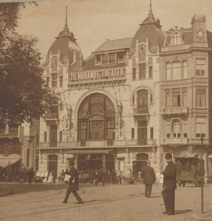 Beschrijving Het Rembrandtplein met het Rembrandttheater, in 1902 gebouwd naar een ontwerp van architect Evert Breman Rechts de ingang van de Bakkersstraat. Documenttype foto Vervaardiger Onbekend Anoniem Collectie Collectie Stadsarchief Amsterdam: foto-afdrukken Datering 1910 ca. Geografische naam Rembrandtplein Inventarissen Afbeeldingsbestand ANWD00440000001